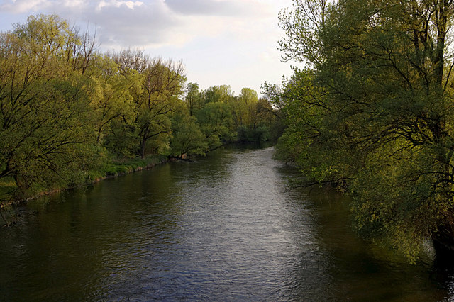 Die Amper bei Inkofen